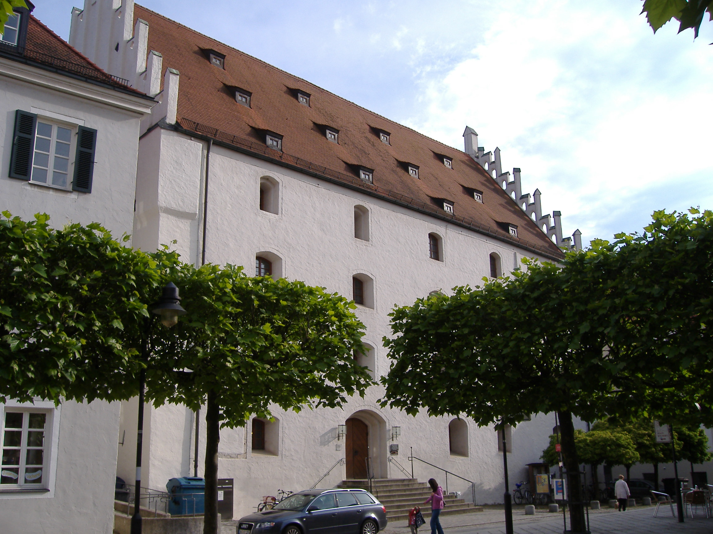 Rückseite des Herzogskastens, vom Carraraplatz aus.